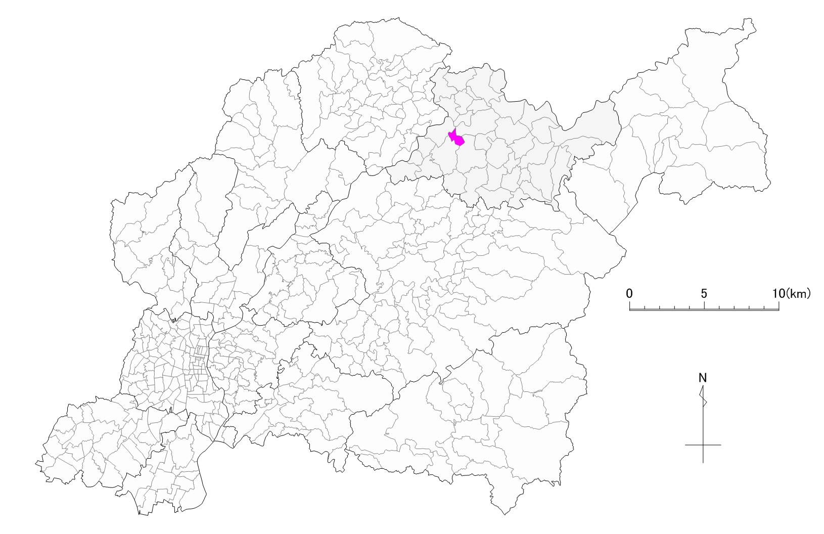 豊田市小田町位置図